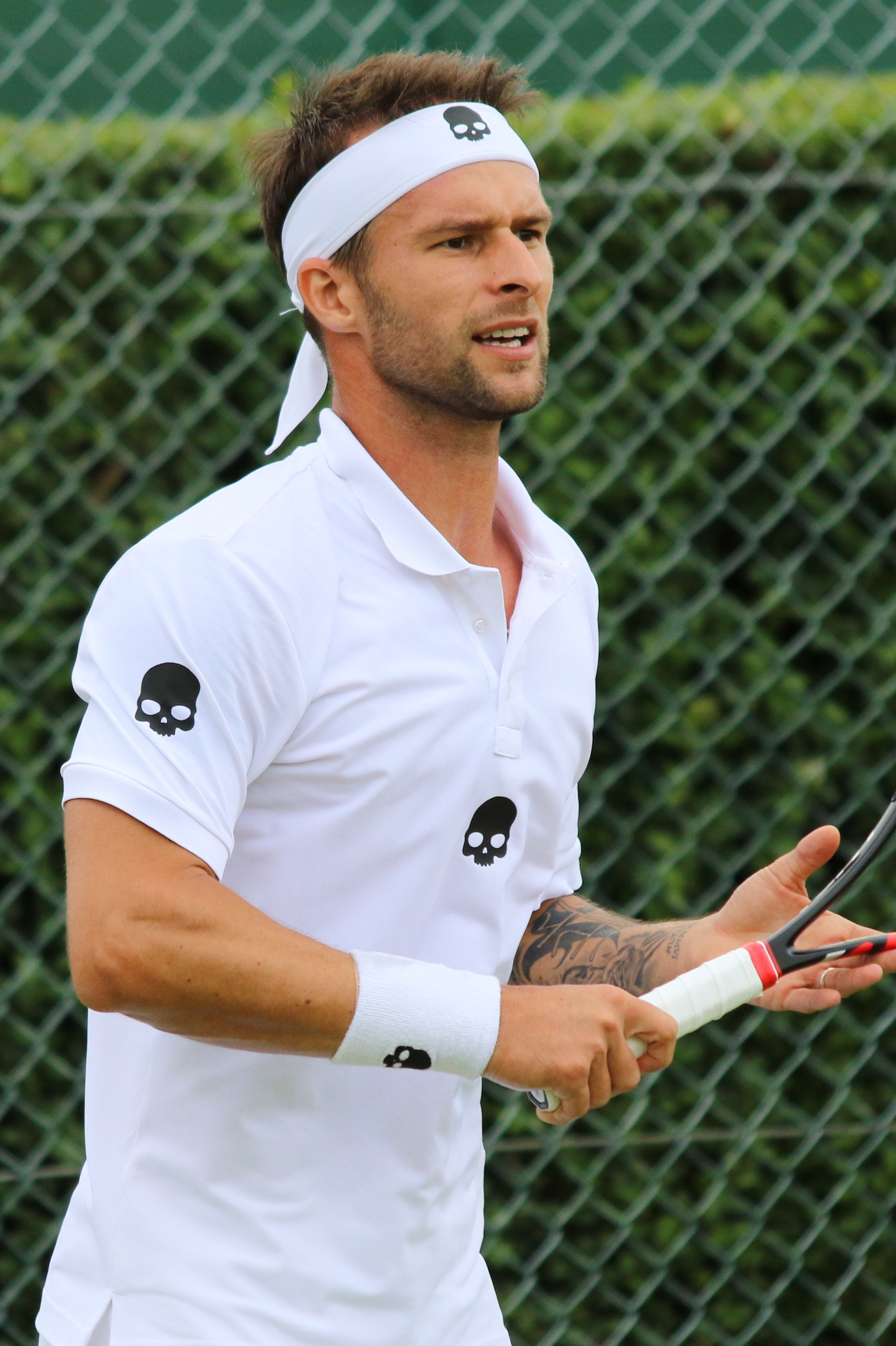 Ungur WMQ16 (8)